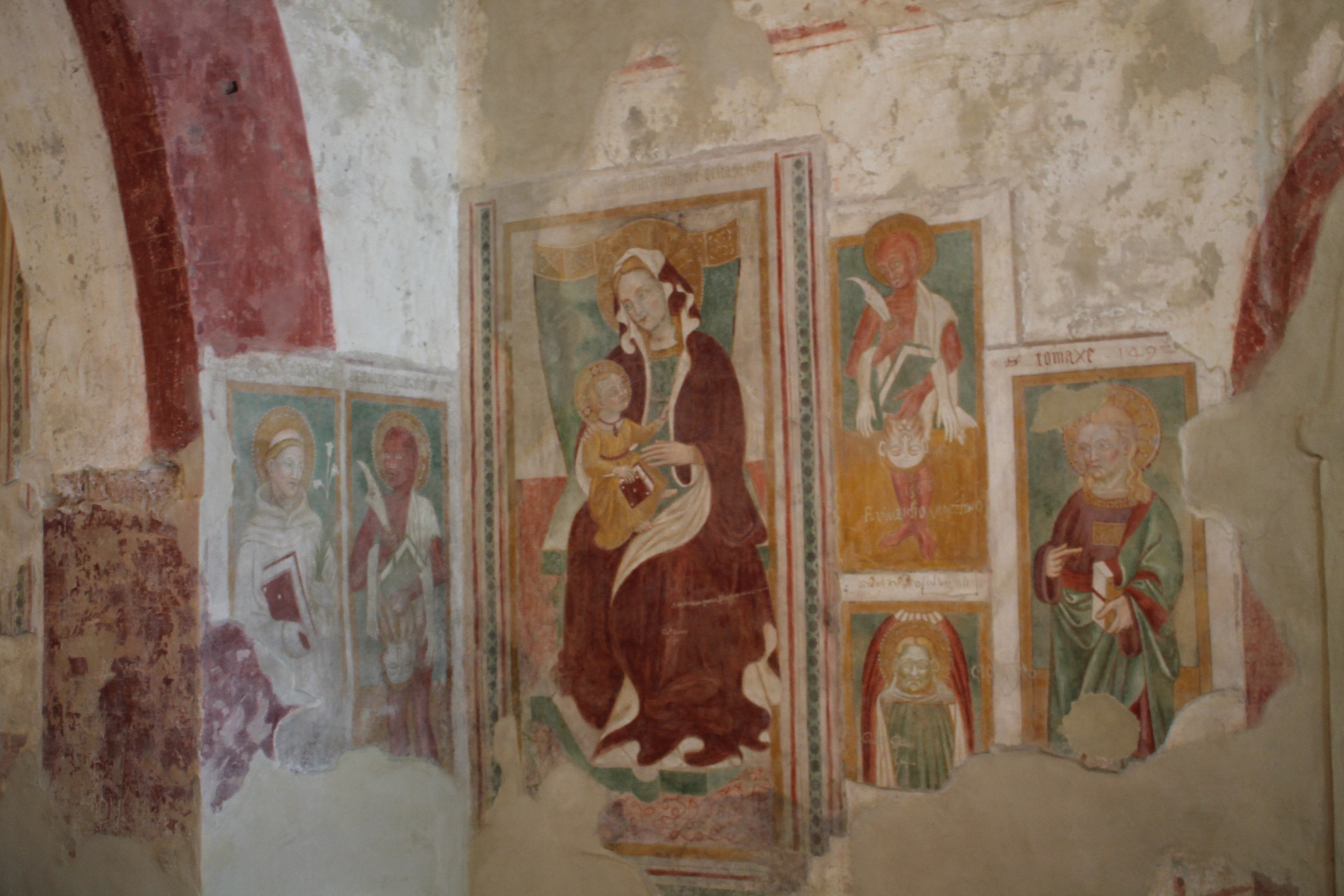 S. Antonio, S.Bartolomeo, Madonna con bambino, S. Bartolomeo, S.Donnino, S. Tommaso